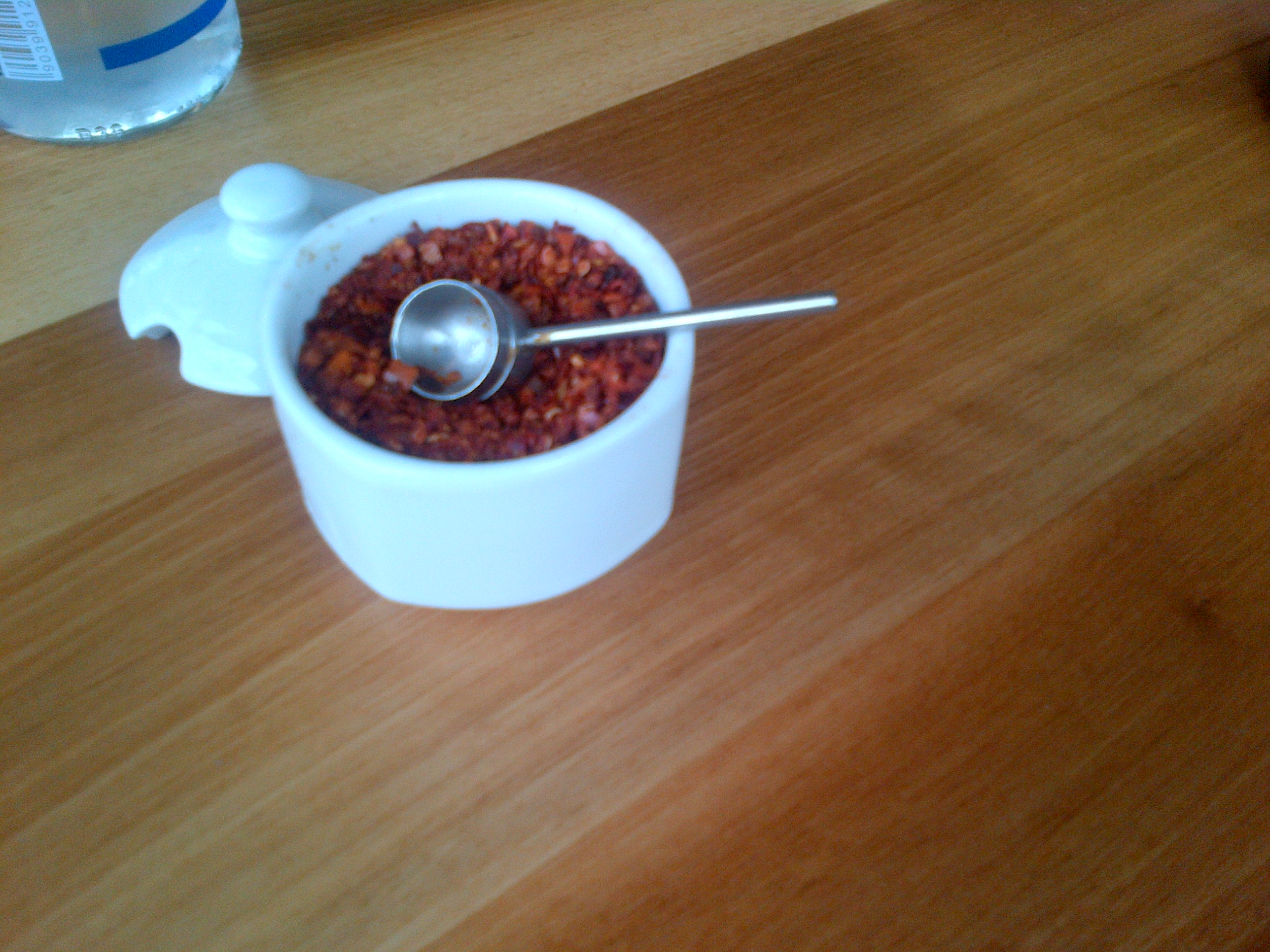 Pul biber en un restaurante turco.